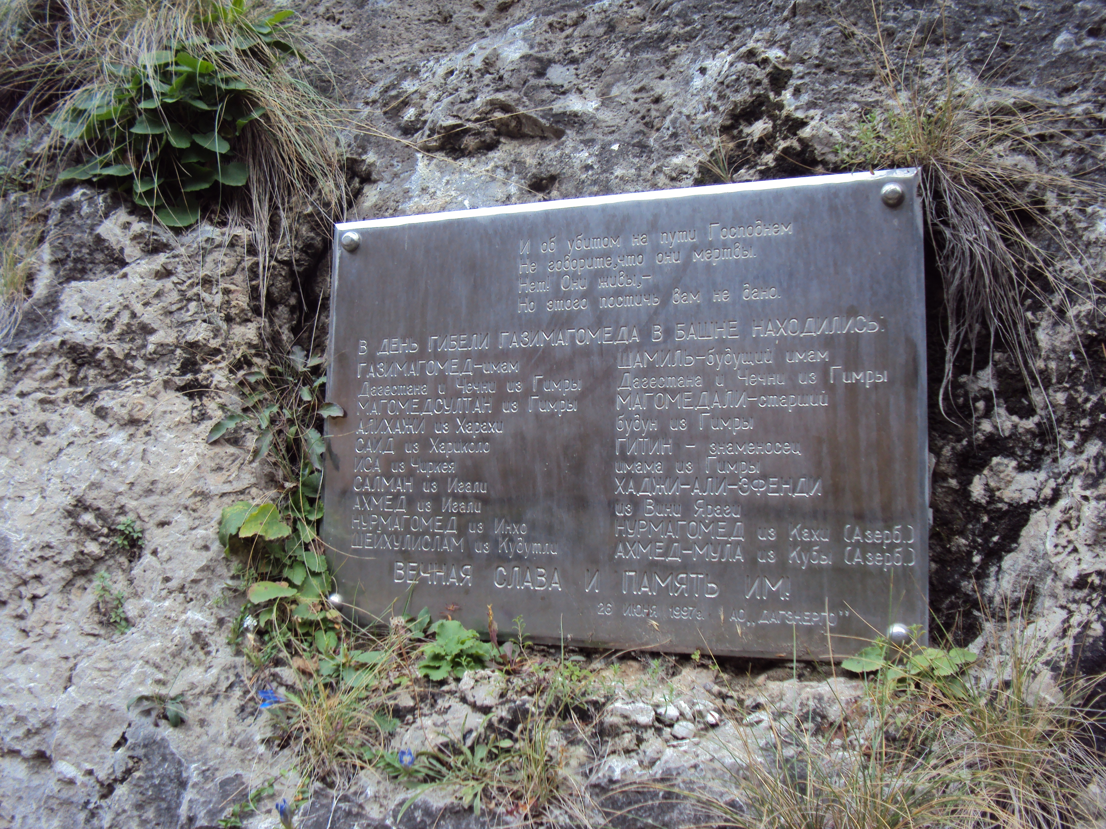 Табличка на Гимринской башне